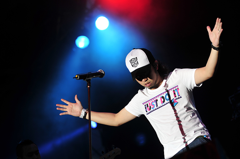 Sunburst KL 2009